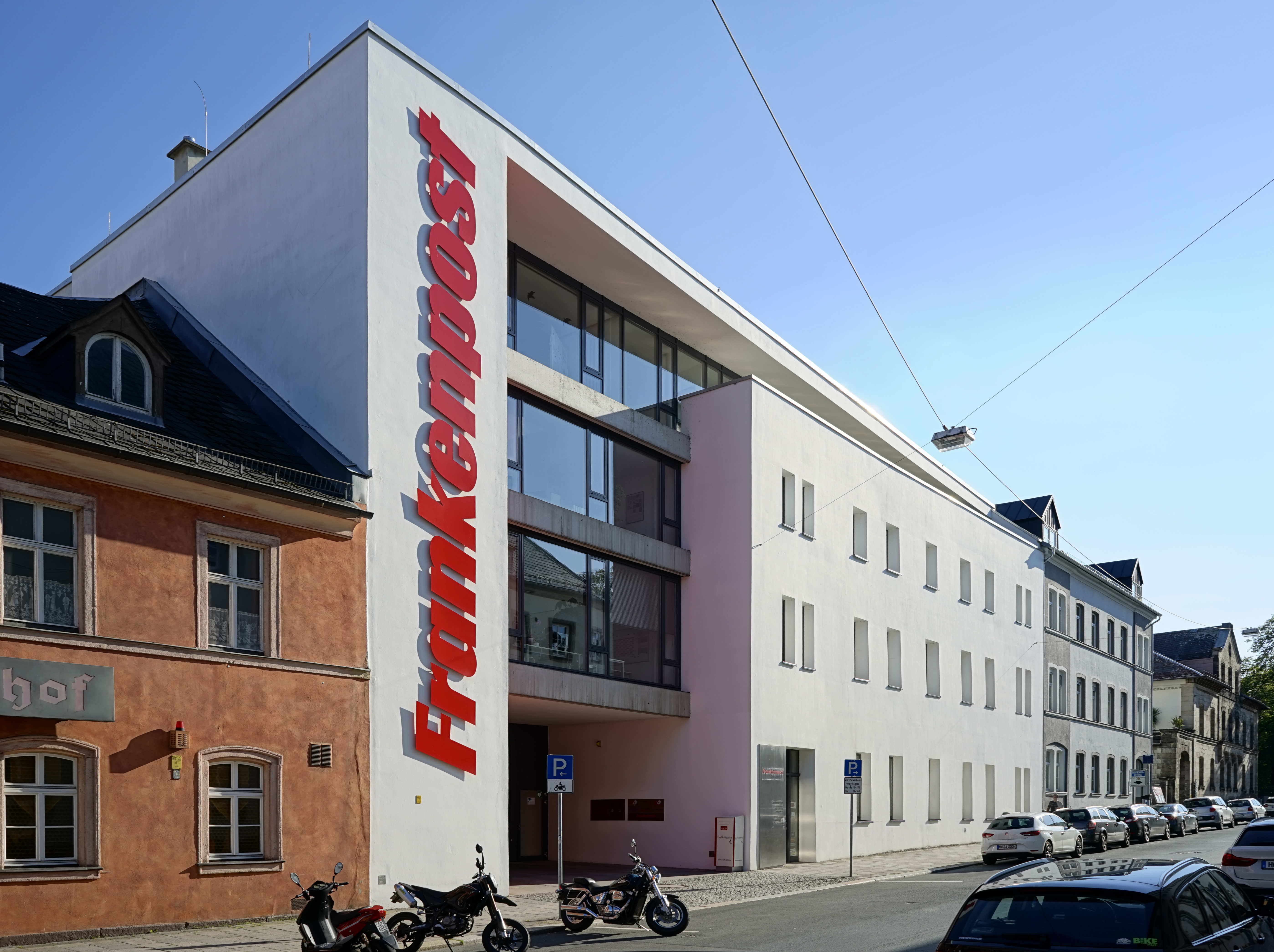 Gebäude der Frankenpost-Verlag GmbH in Hof, Poststraße 9-11, 95028 Hof.